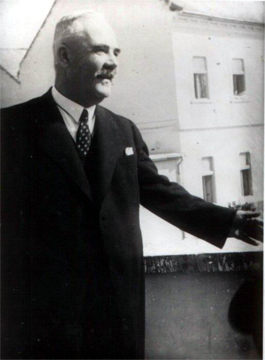 Бачинський Едмунд Степанович, Ужгород 1938 р.